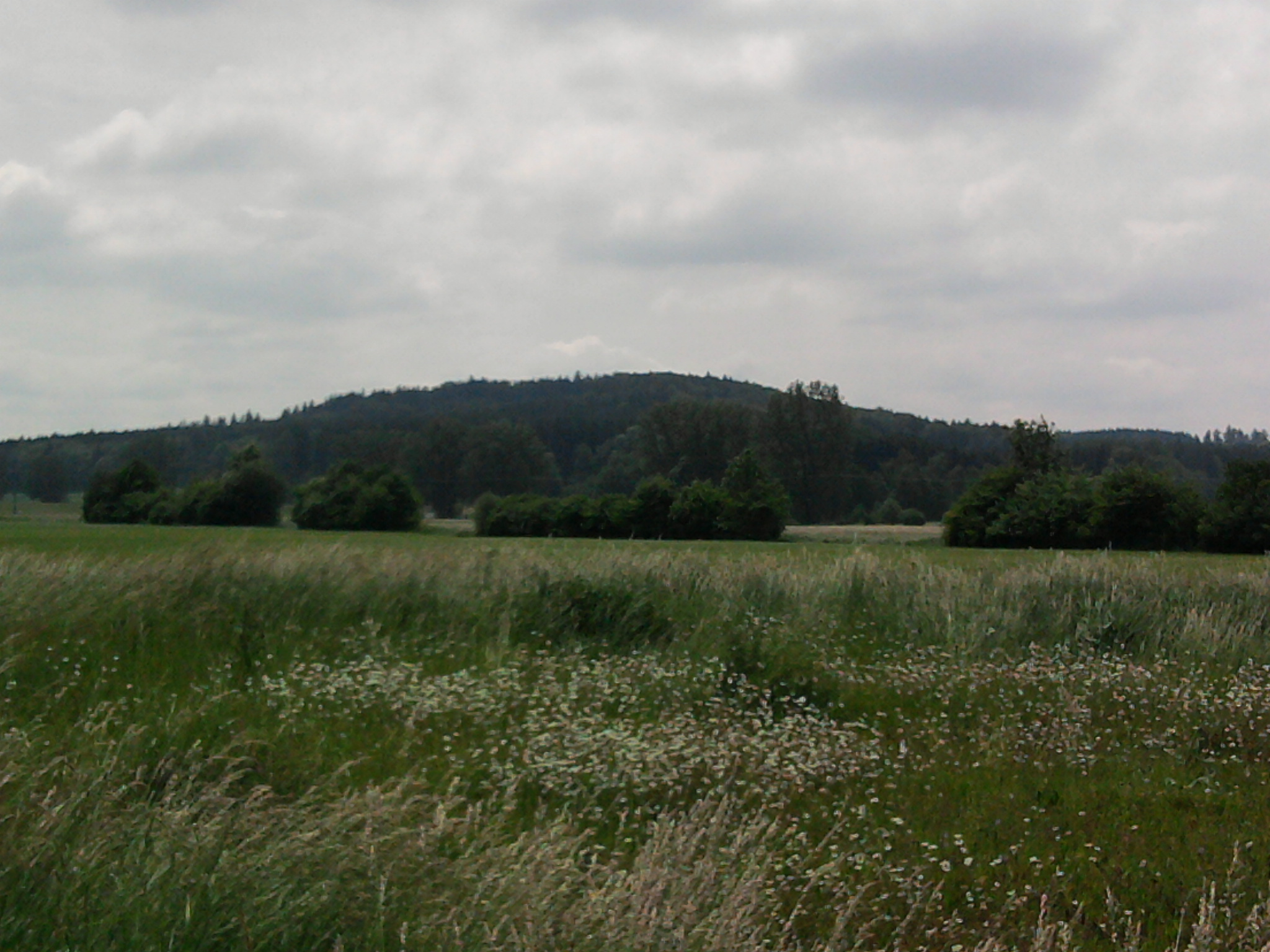 Berg Roßkopf bei Dirlewang, zukünftiger Standort der Dirlewanger Bürgerbeteiligungsbatterie